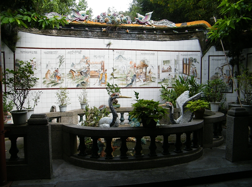 青云岩大峰祖师殿前